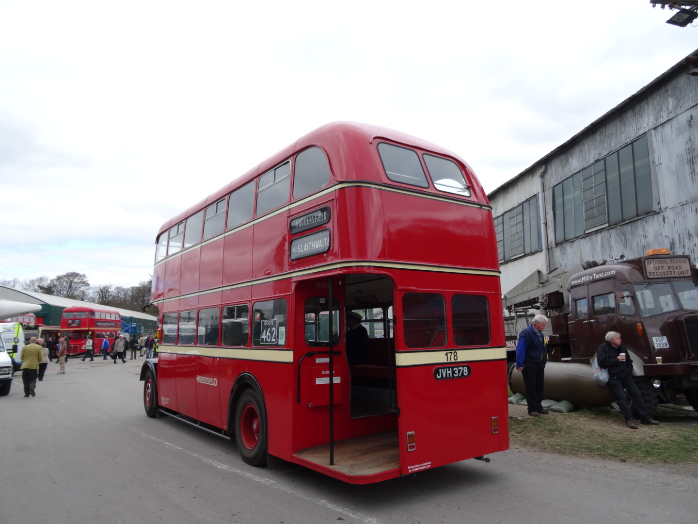 LONDON BUS MUSEUM BROOKLANDS 2015